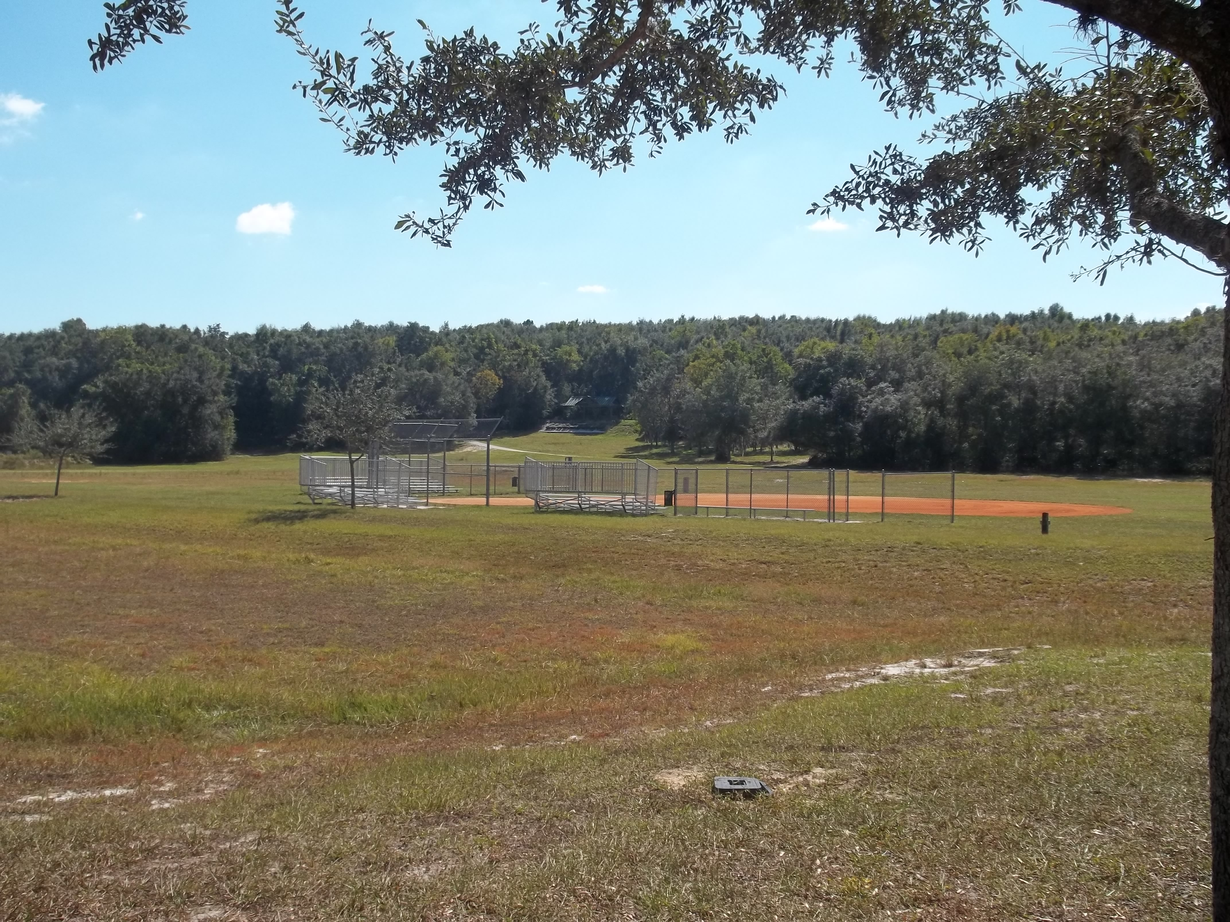 Minneola, Florida: Trailhead Park